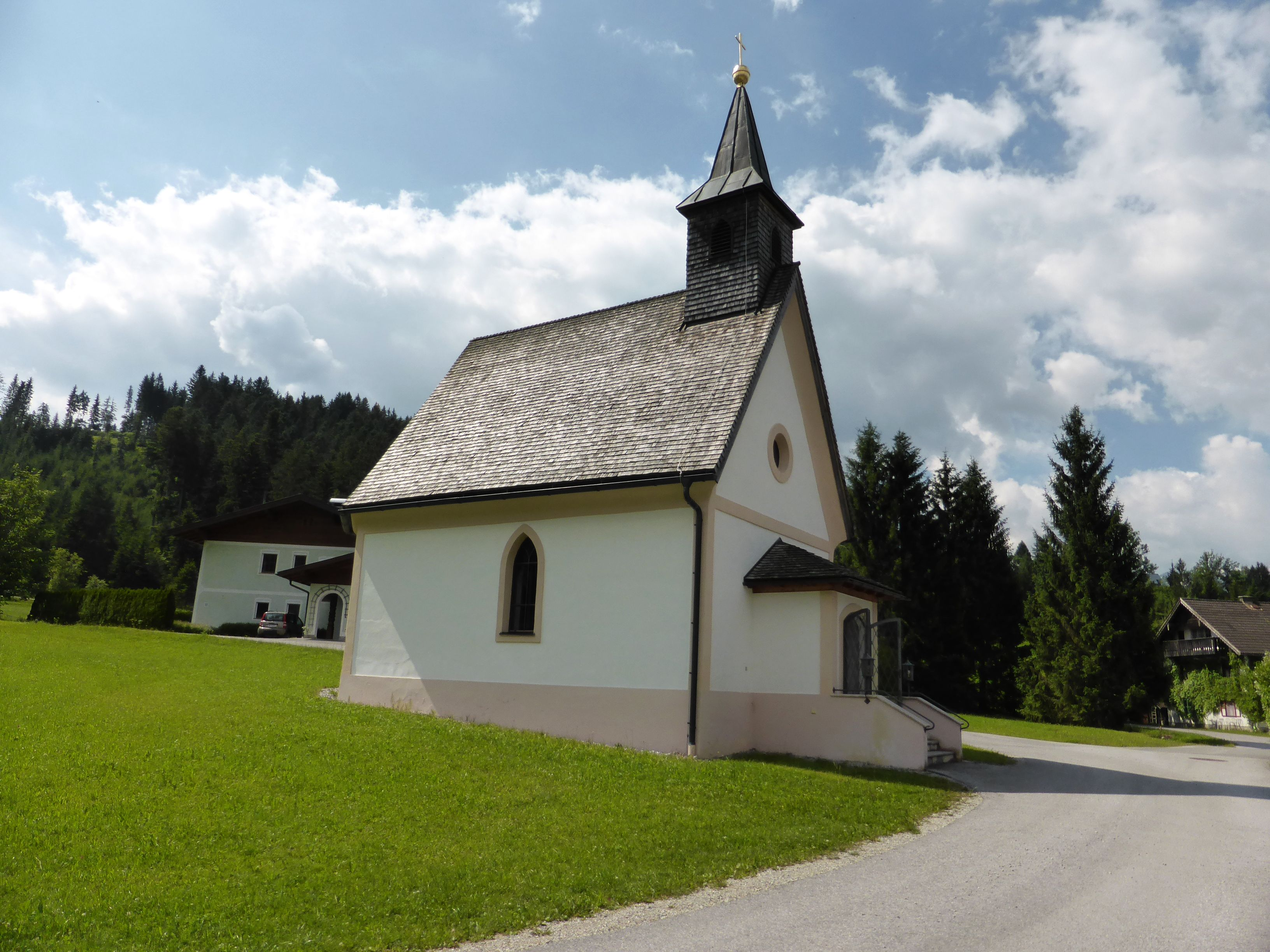 Kapelle Herz Jesu und hl. Leonhard (Kapelle in Stocker, Radochsbergkirchlein)